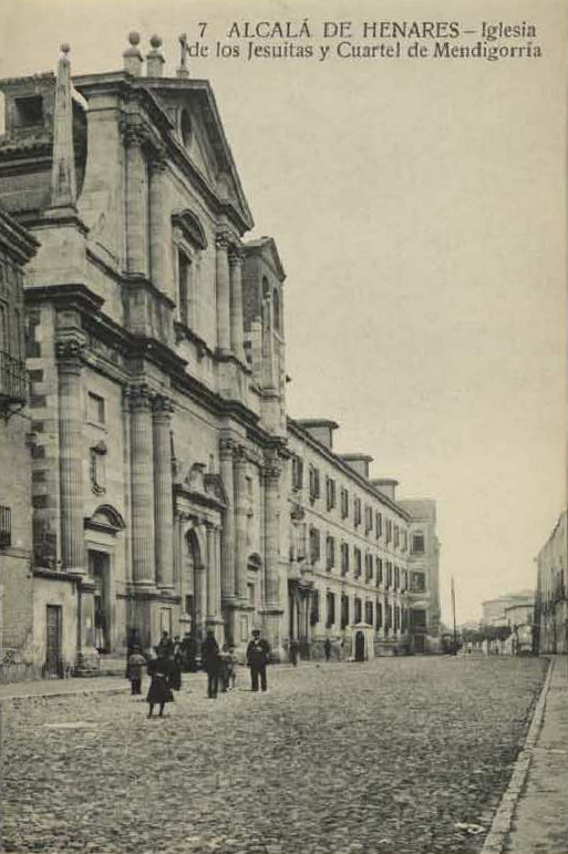 Postal de la Iglesia de Santa María La Mayor y el Cuartel de Mendigorría en Alcalá de Henares (Comunidad de Madrid - España). Antiguos edificios del Colegio Máximo de la Compañía de Jesús, y actualmente Facultad de Derecho de la Universidad de Alcalá.